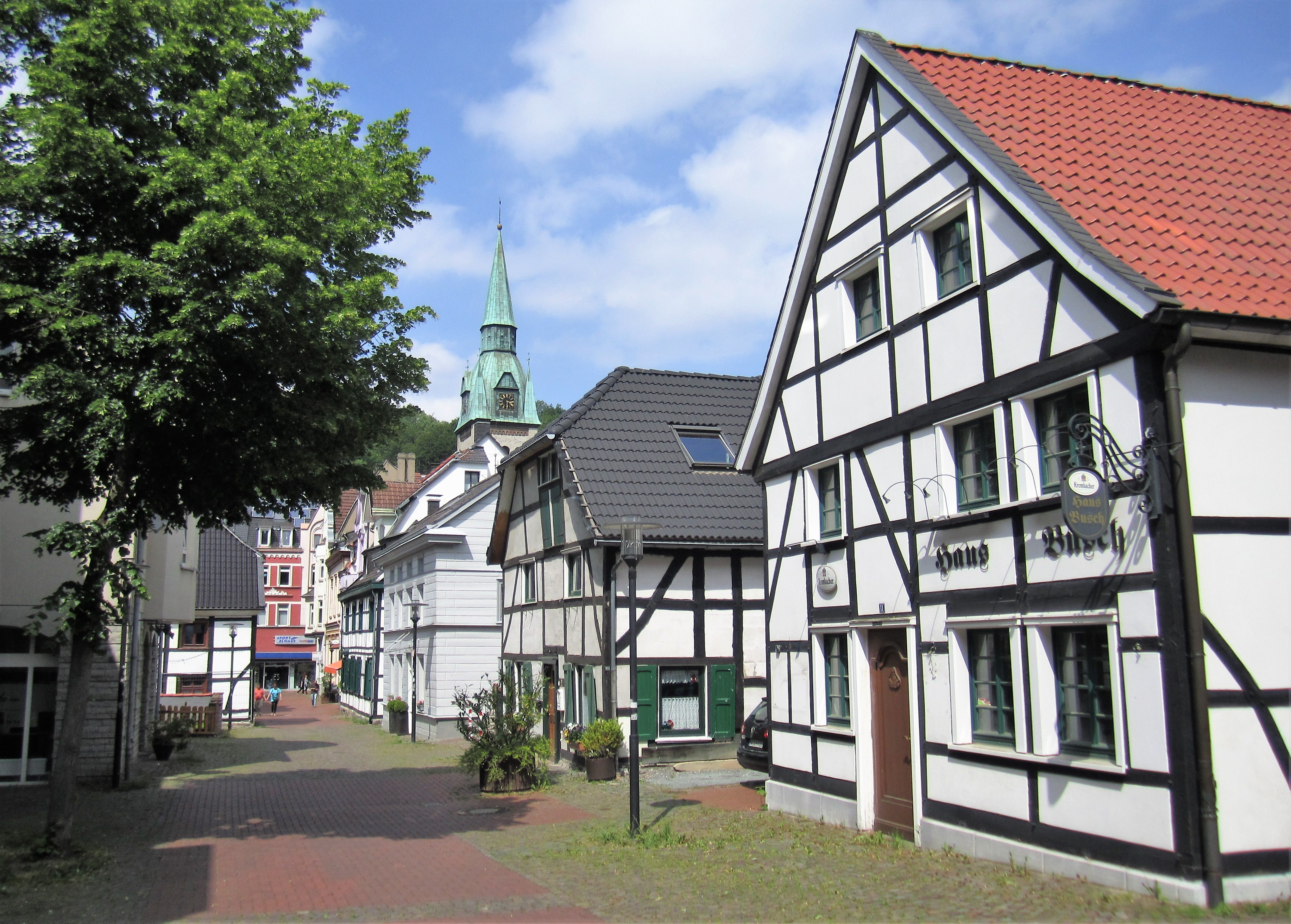 Blick in die Lohmannstraße im Hagener Stadtteil Hohenlimburg. Rechts die ehemalige Gaststätte „Haus Busch“ (Neubau aus den 1990er Jahren), anschließend die denkmalgeschützten Häuser Lohmannstraße 9, 7, 5, und 6. Im Hintergrund die Freiheitstraße mit der ev.-ref. Kirche.